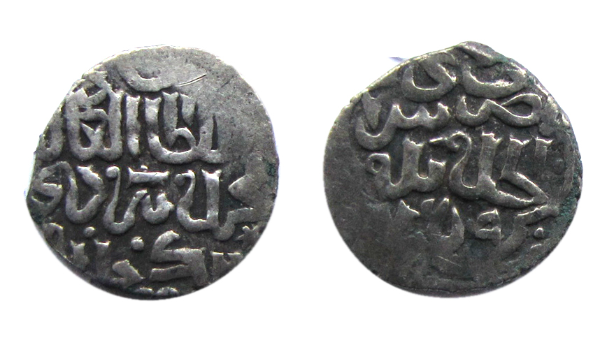 Найден в 2010 году в составе большого клада на территории Воронежской области